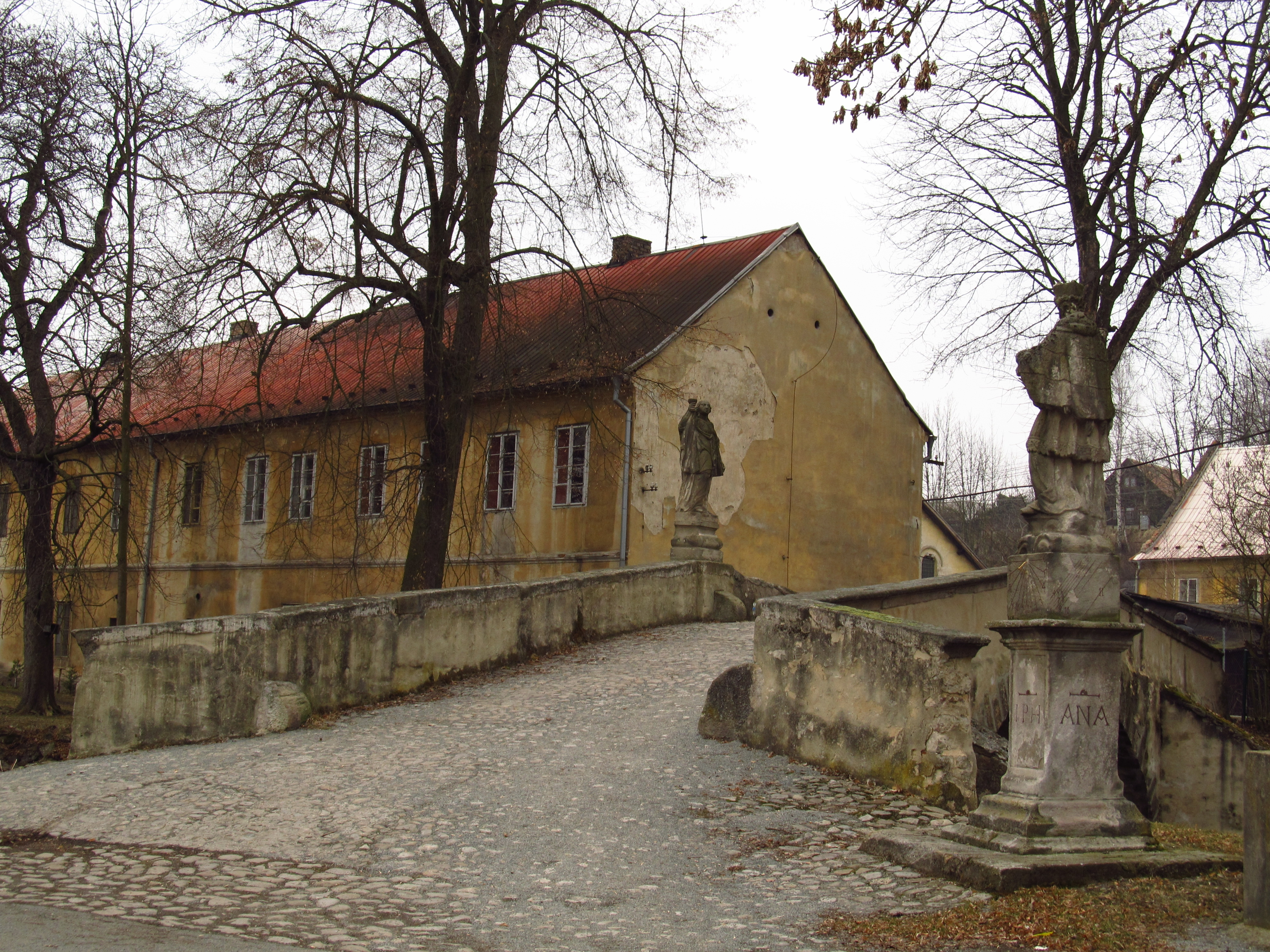 Silniční most se sochami sv. Barbory a sv. Jana Nepomuckého (Dobřív), přes Padrťský potok, poblíž čp. 48, Dobřív